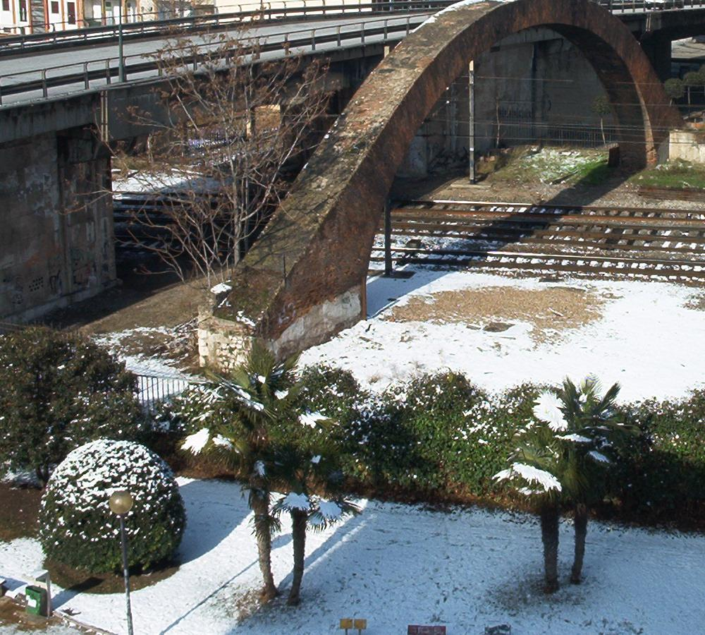 El Arco de Ladrillo (Valladolid), arco conmemorativo sobre las vías del ferrocarril Madrid-Hendaya, nevado en invierno.